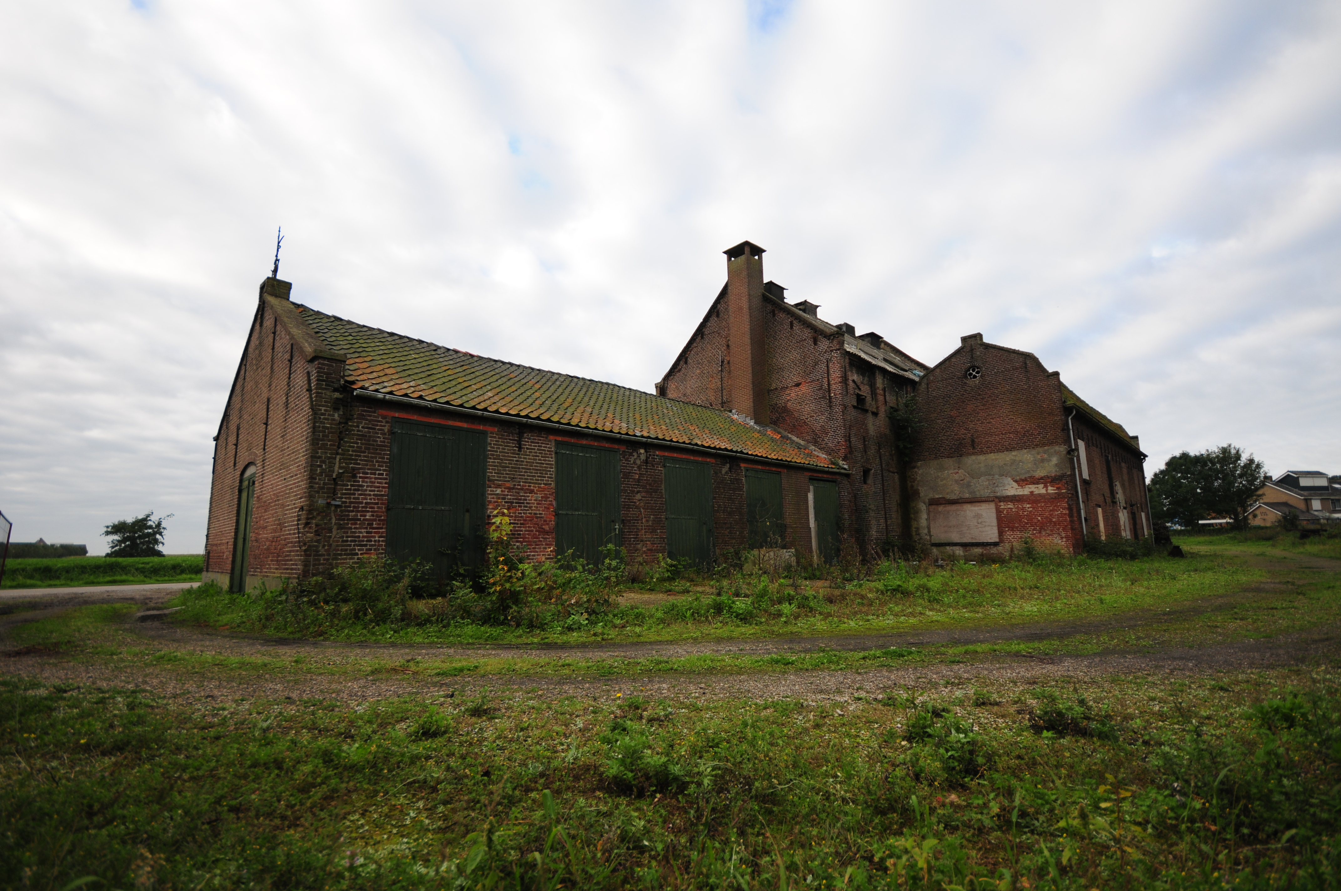 Smalle Einde 2 3253 XH te OUDDORP, Goedereede (ZH)